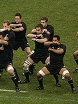 Haka